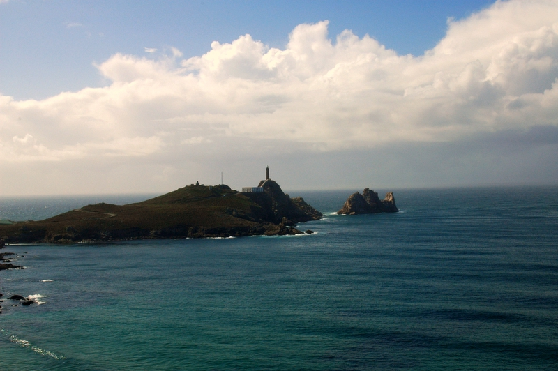 Faro Vilano, Camariñas - A Coruña